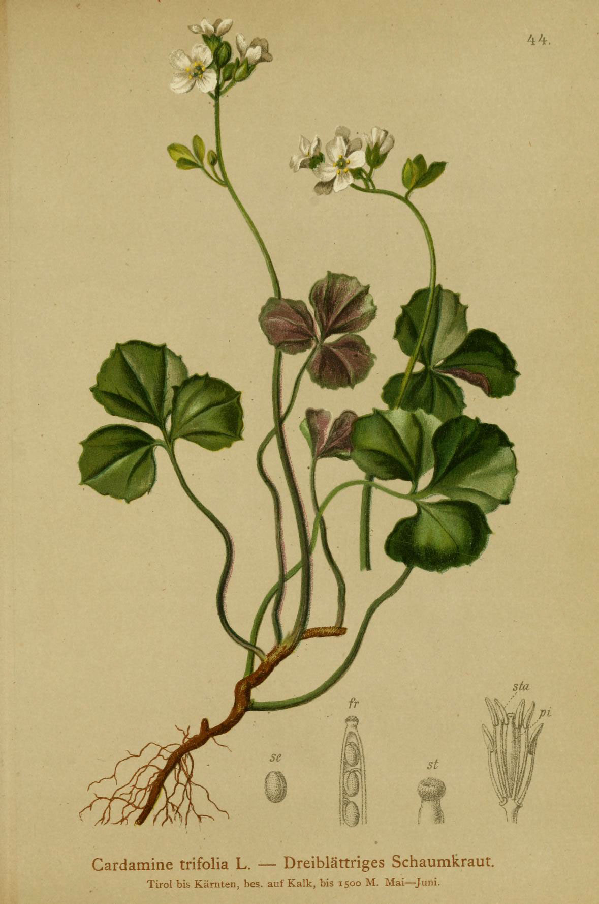 Gardamine trifolia L. — Dreiblättriges Schaumkraut. Tirol bis Kärnten, bes. auf Kalk, bis 1500 M. Mai— Juni.